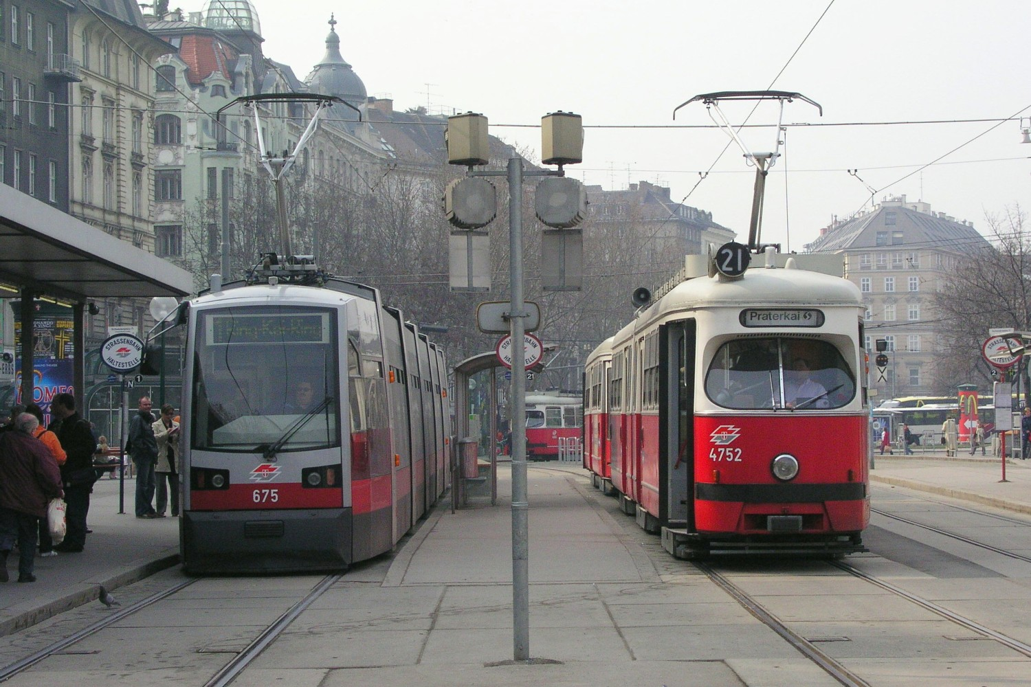 ULF tramcar type B on line "1" and tramcar type E1 on line "21" meeting at Schwedenplatz - ULF-Triebwagen Type B auf Linie 1 und E1 auf Linie 21 am Schwedenplatz own image, 25 March 2005 Photographer: Martin Ortner, Vienna, Austria